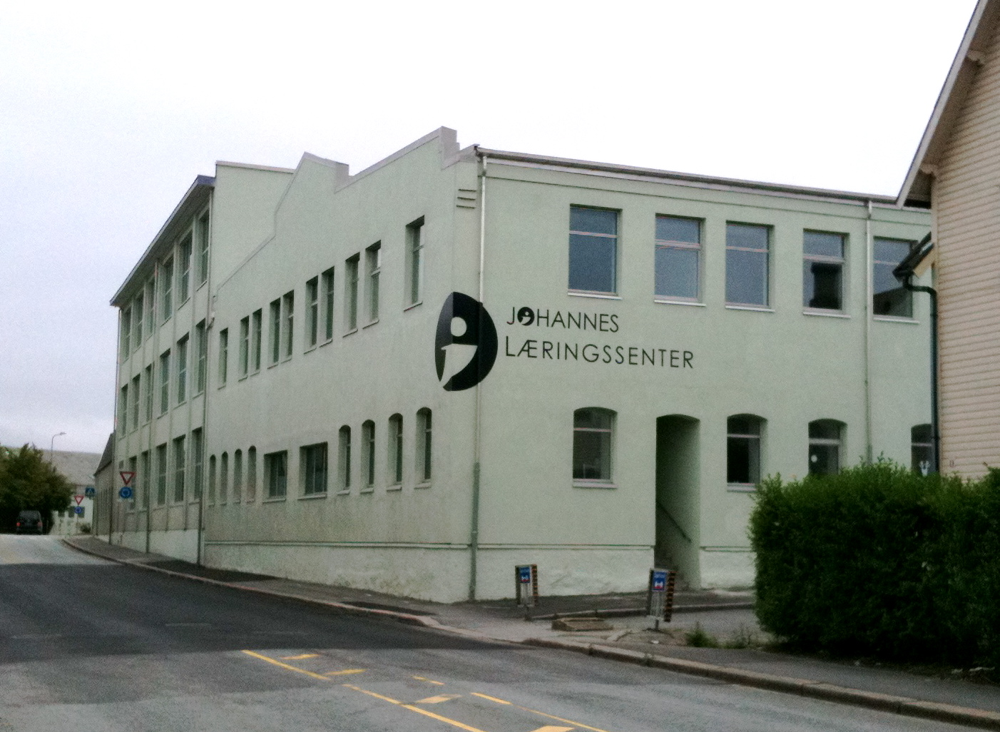 Johannes Læringssenter i Stavanger